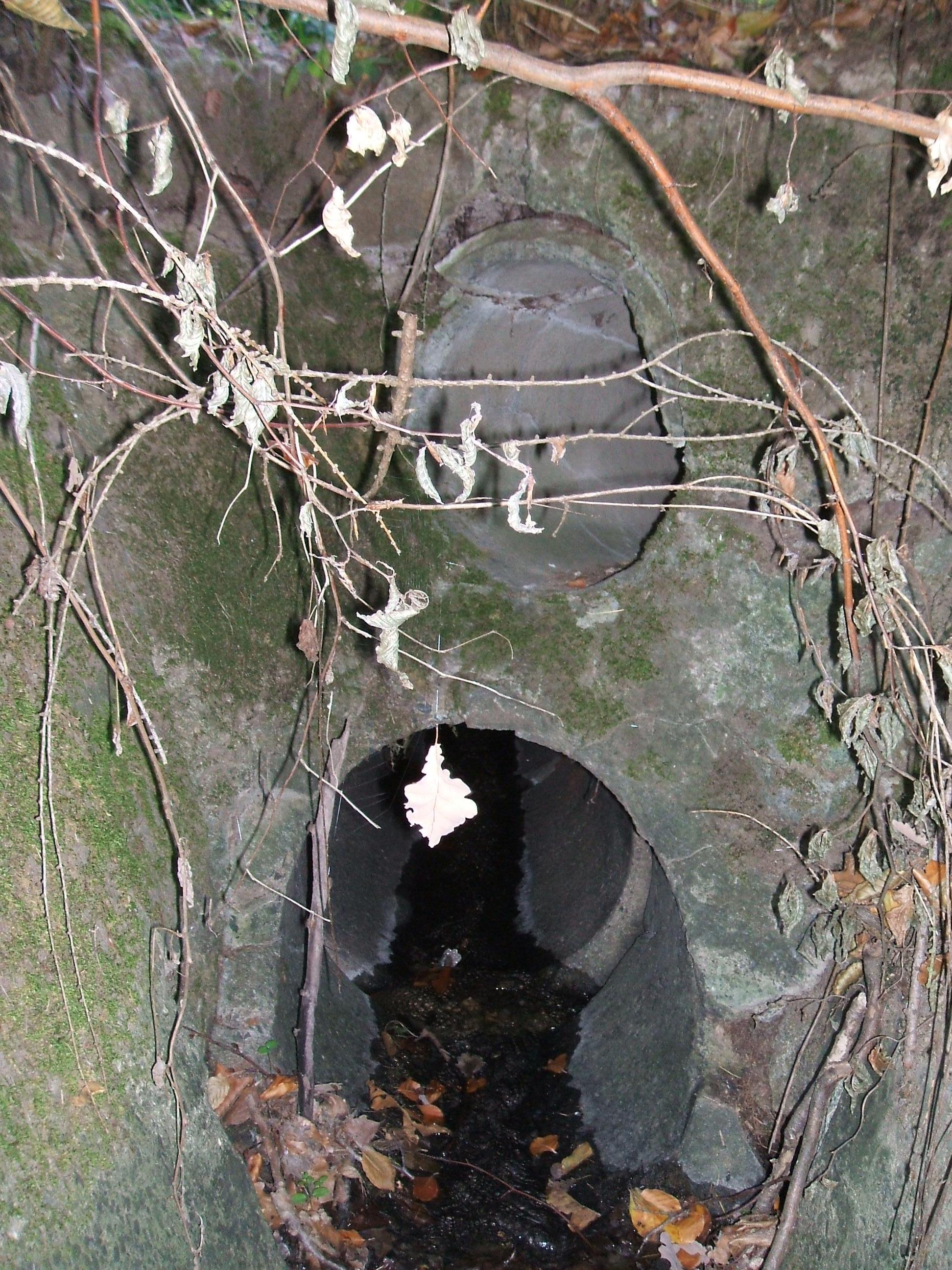 Der famose zweigeschossige Durchlass, unten unter der Usinger Straße durch, oben zum Verbleib im Straßengraben